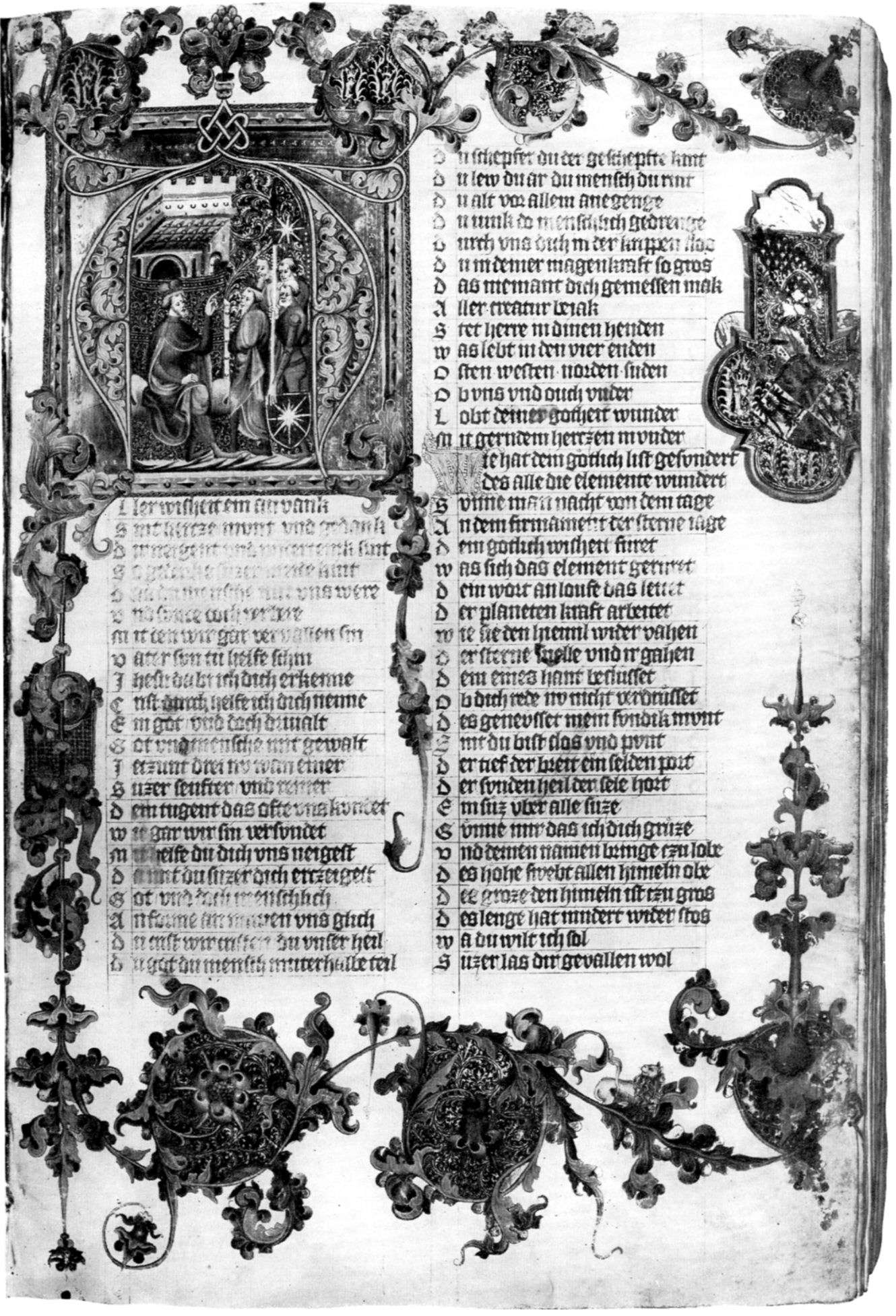 Wien, Österr. Nationalbibl., Cod. Ser. nova 2643, Bl. 1r Anfang der Arabel Ulrichs von dem Türlin